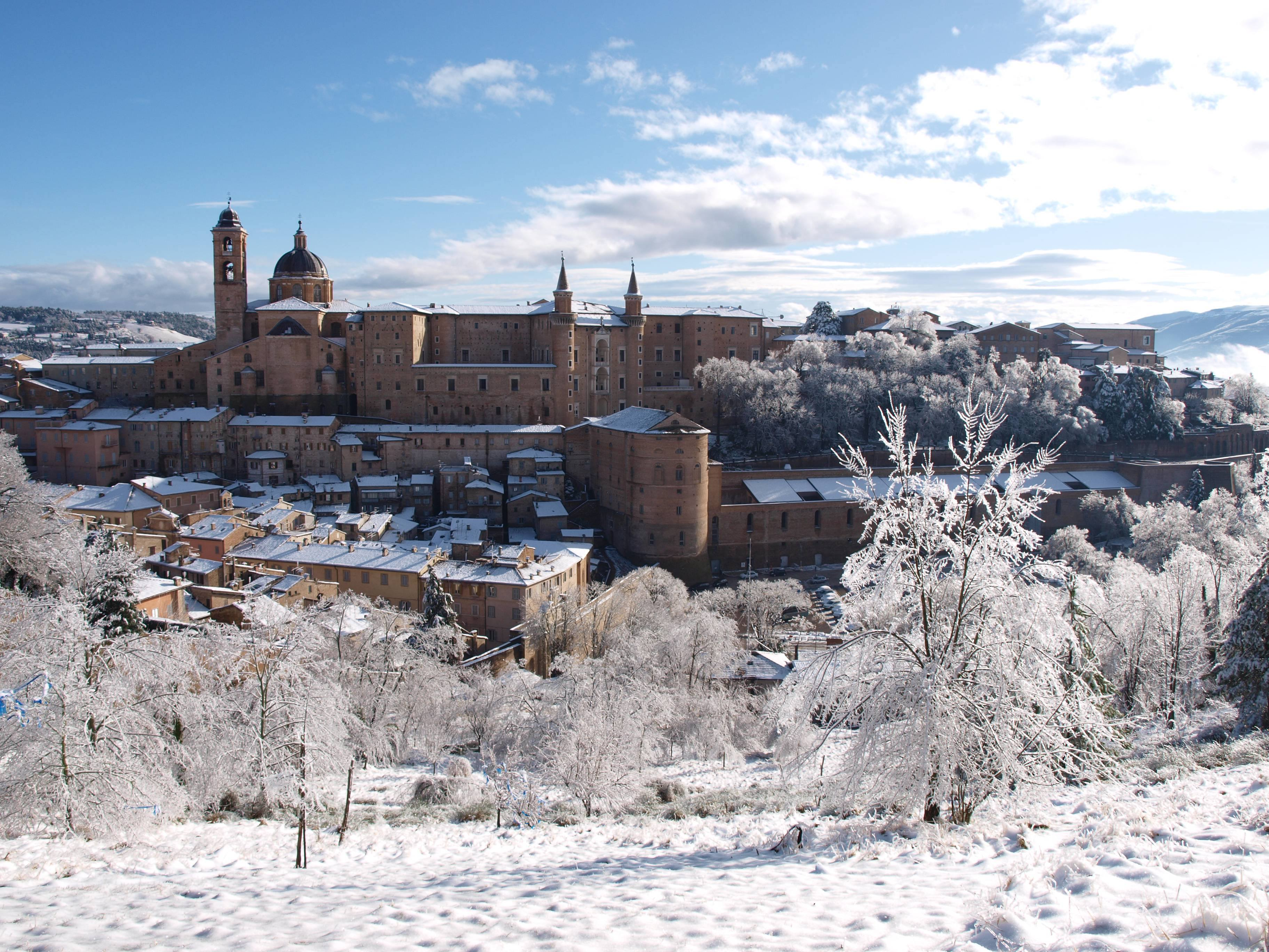 Palazzo Ducale di Urbino - Galleria Nazionale delle Marche - MIBAC This is a photo of a monument which is part of cultural heritage of Italy.